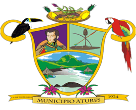 Escudo Municipio Atures